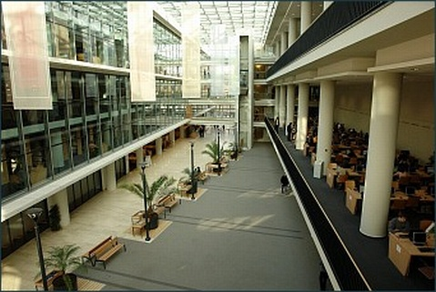 A József Attila Tanulmányi és Információs Központ épülete (SZTE, Szeged)